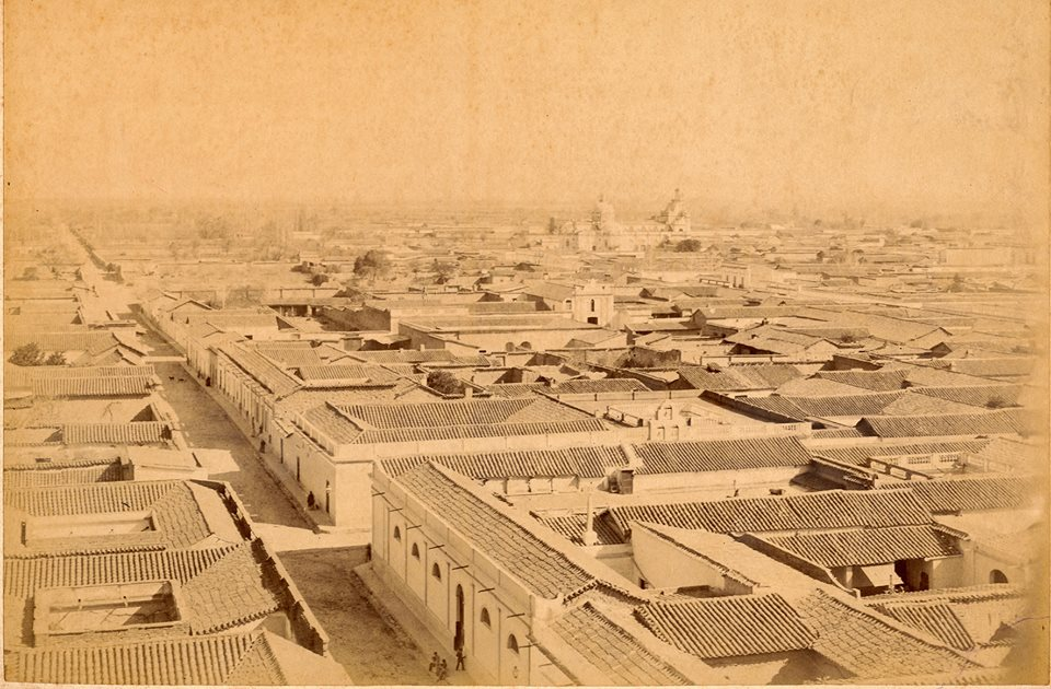 "Vista panorámica de la Ciudad de Salta, siglo XIX. Documento Fotográfico. Aficionados, inventario 213319."